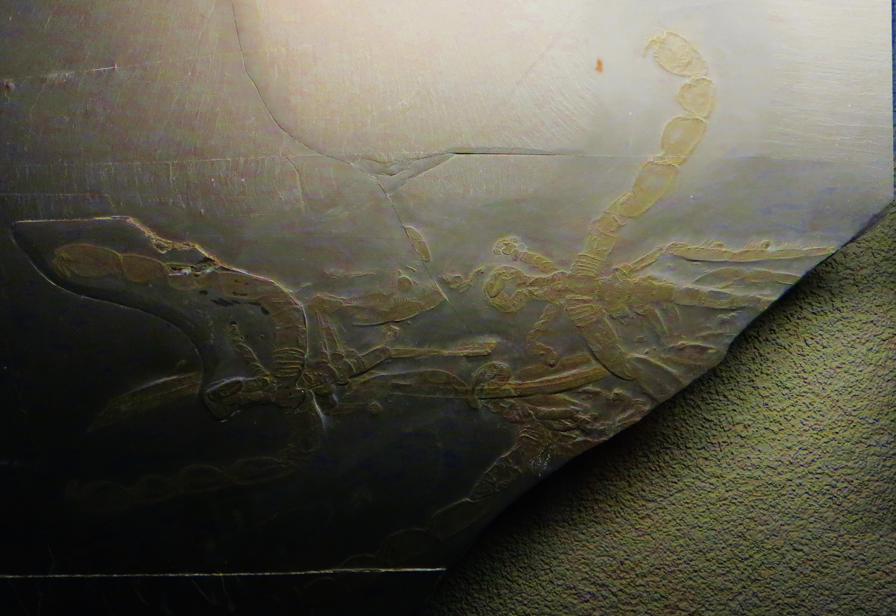 Fossil of Palaeoisopus, an extinct arthropod- Took the picture at Naturalis, Leiden